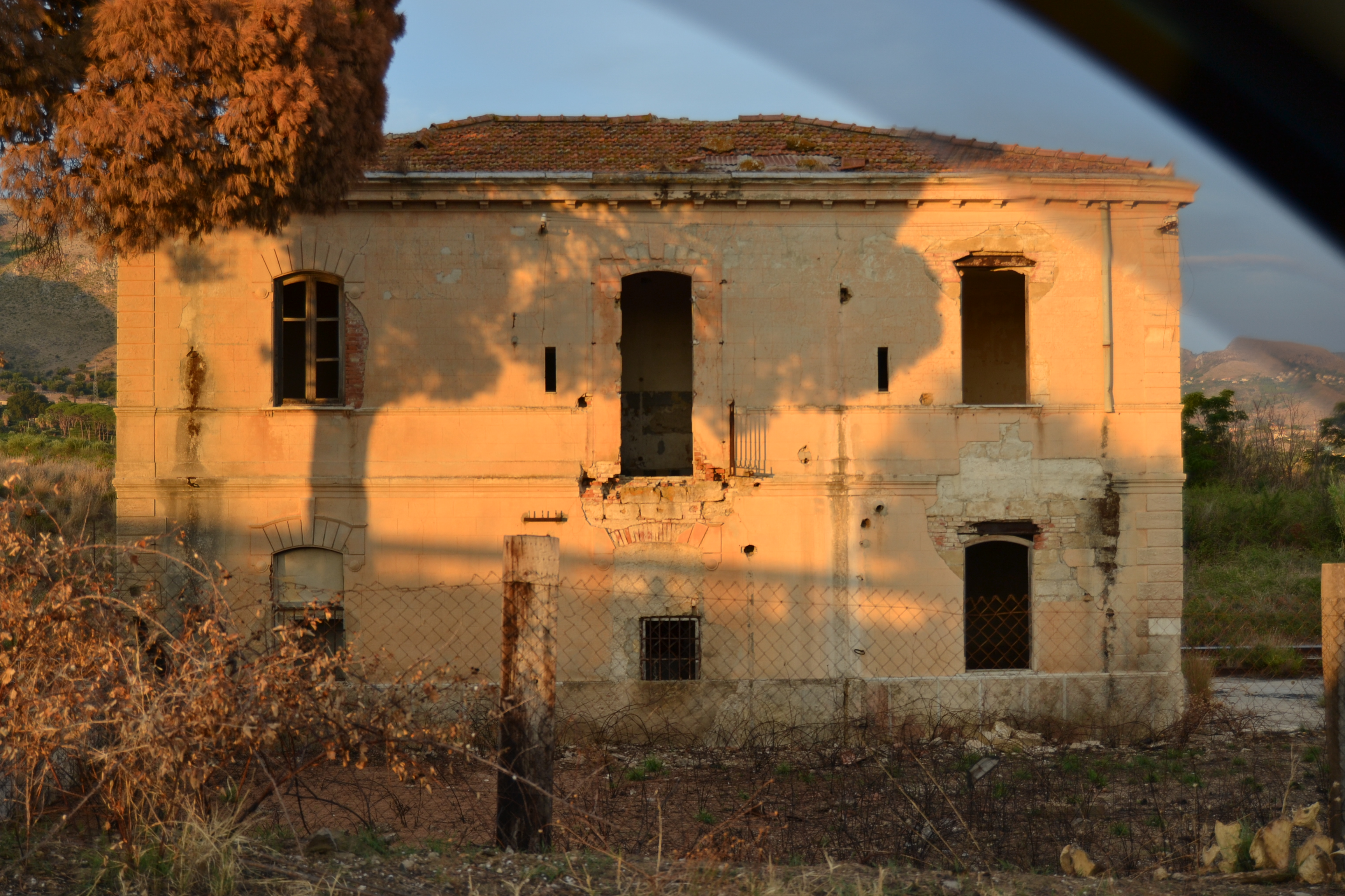 Stazione ormai abbandonata presso Lo Zucco